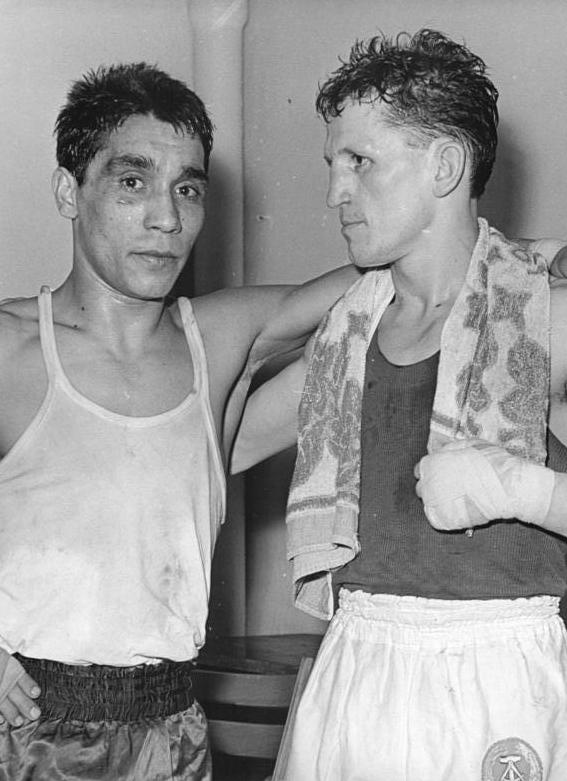 Stefan Panajatow, Otto Babiasch Zentralbild Semeniuk Ma-Gro. 29.2.1964 Box-Europokal DDR-Bulgarien 12:6 Nach einer kämpferisch guten Leistung blieb der deutsche Fliegengewichtsmeister Otto Babiasch (rechts, nach dem Kampf in der Kabine) über den Vize-Europameister 1963 Stefan Panajatow (Bulgarien) durch einen knappen aber einstimmigen Punktsieg erfolgreich. Bulgariens Boxer verloren am 28.2. in der Berliner Werner Seelenbinder-Halle den Boxländerkampf gegen die DDR mit 6:12 Punkten. Im Kampf um den erstmals ausgetragenen Europokal erreichten sie dennoch den dritten Platz, da sie in Sofia (16.2.64) hoch mit 16:4 gewonnen hatten. Im Schwergewicht wurden beide Kämpfer wegen unsauberen Boxens disqualifiziert.